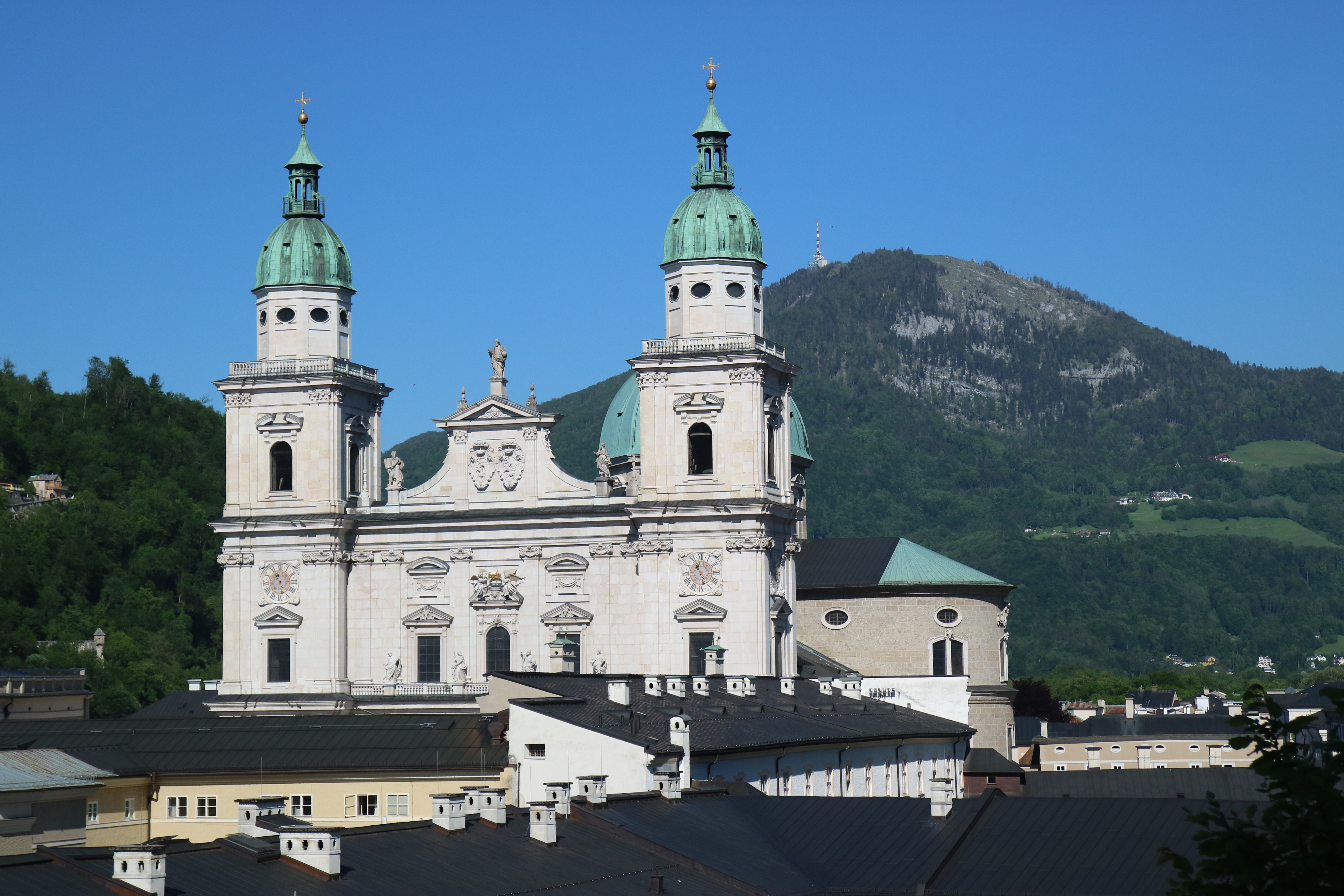 Salzburger Dom von Westen, im Hintergrund der Gaisberg